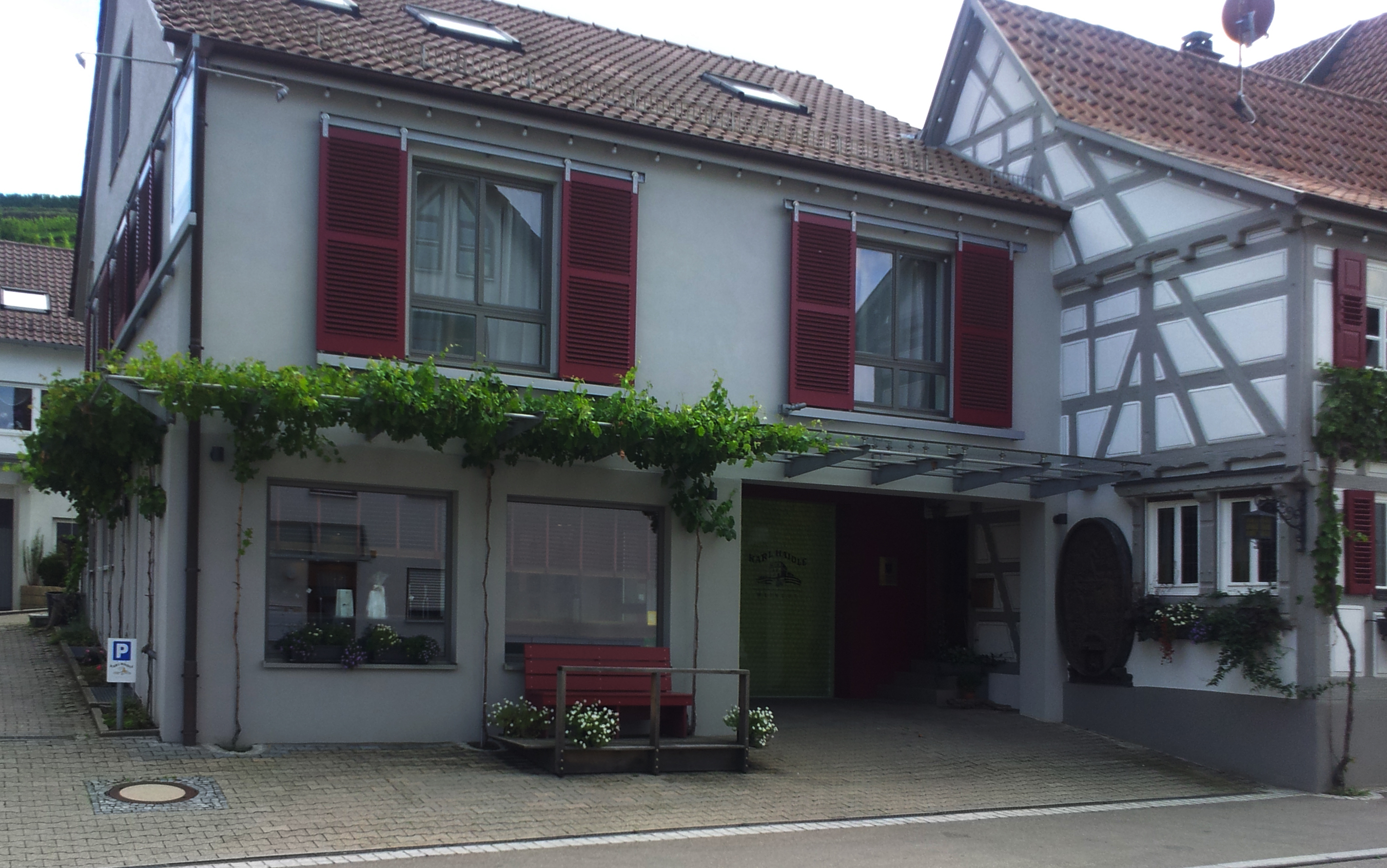 Das Weingut Haidle in Stetten im Remstal.